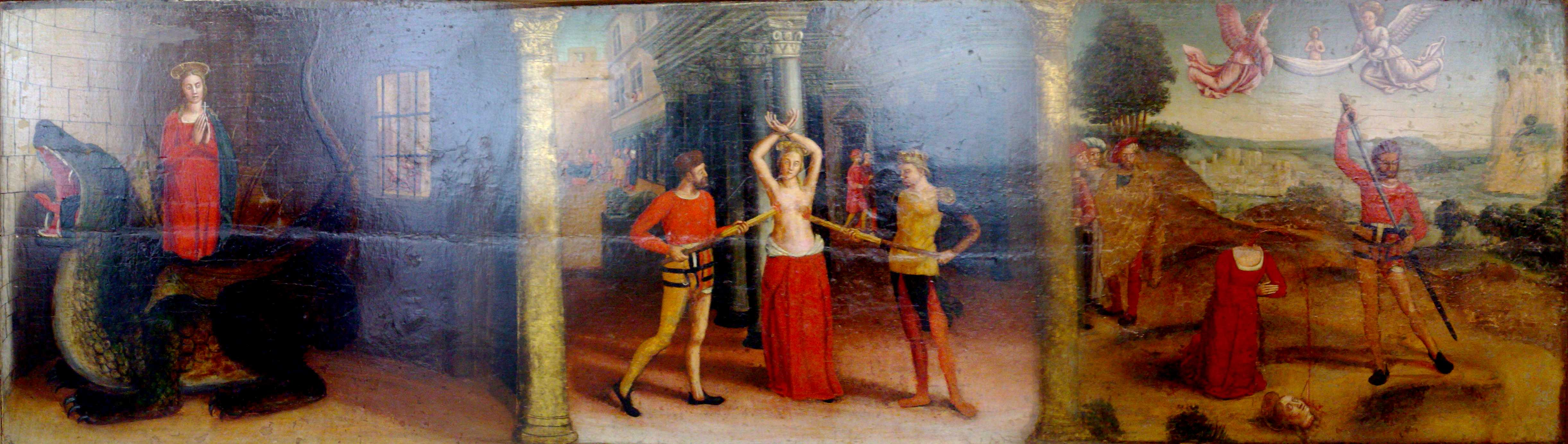 Predelle du retable de Sainte Marguerite (provenant de l'église de Lucéram) par Louis Brea - Musée des Beaux-Arts de Nice